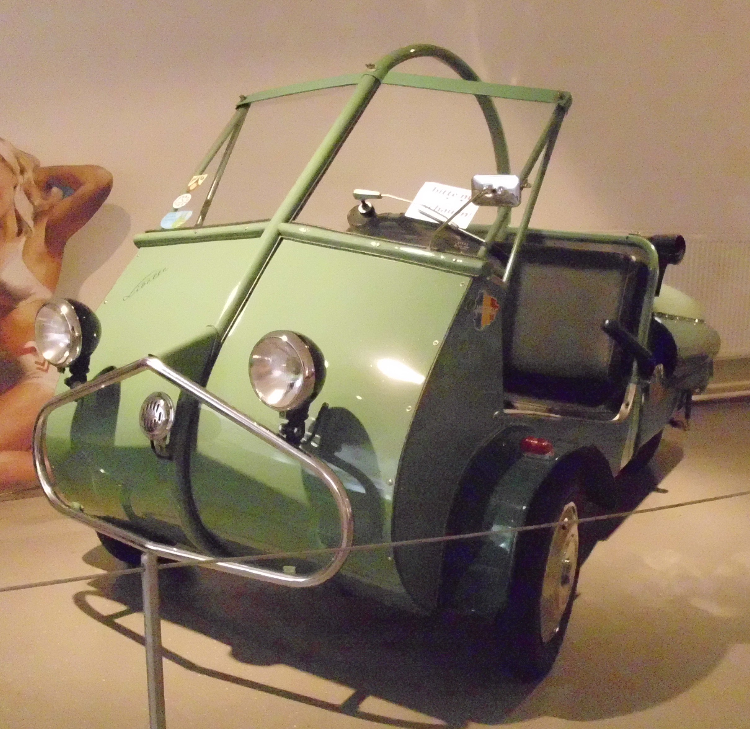 Libelle Allwetter-Autoroller 1954 im RRR Roller, Rollermobile & Wurlitzer-Museum in Eggenburg, Österreich